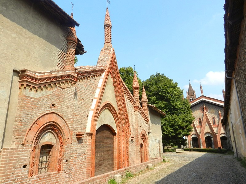 Buttigliera Alta - Facciata dell'ospedale dei pellegrini presso l'Abbazia di S. Antonio di Ranverso